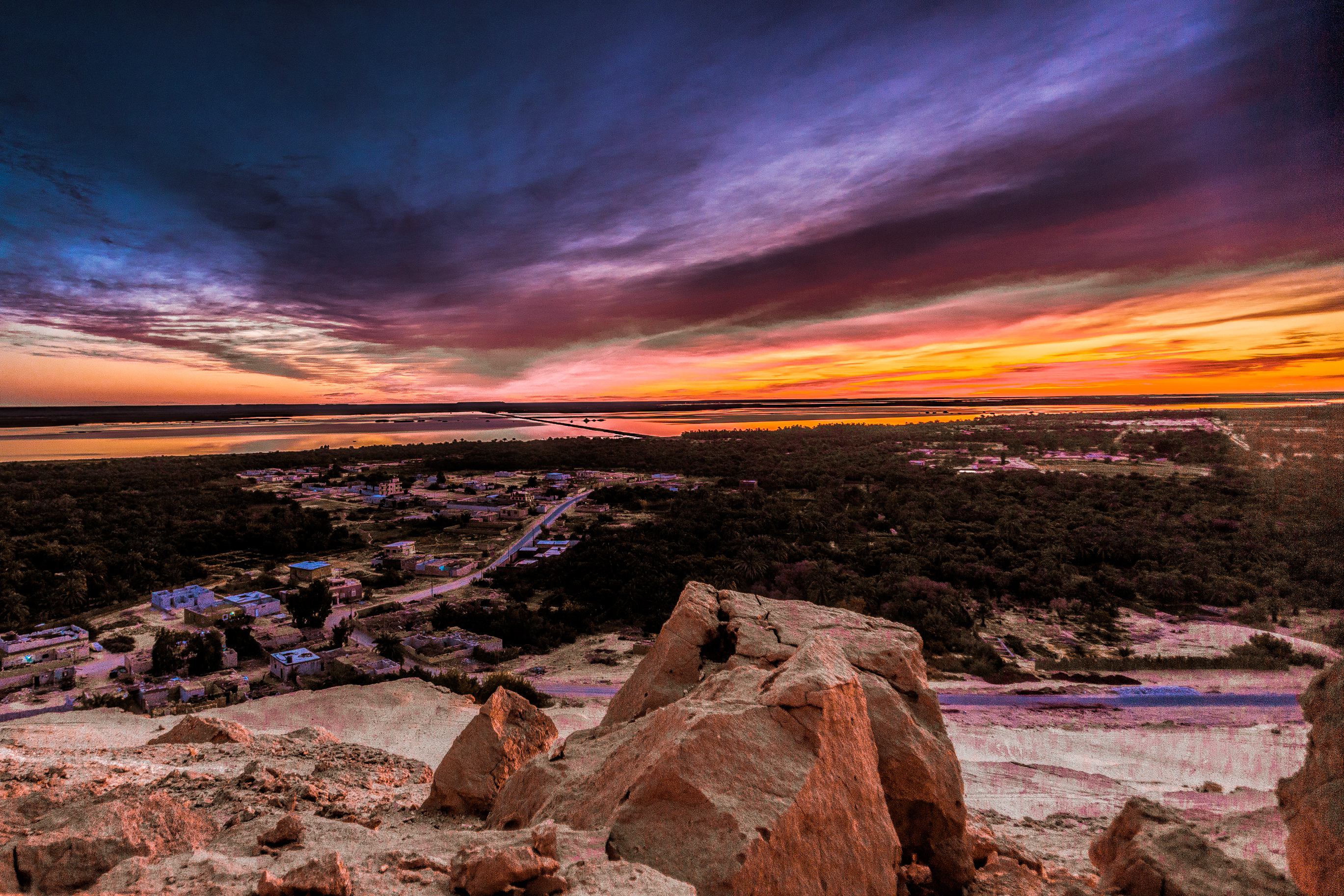 شروق يوم جديد من على جبل الدكرورى سيوة